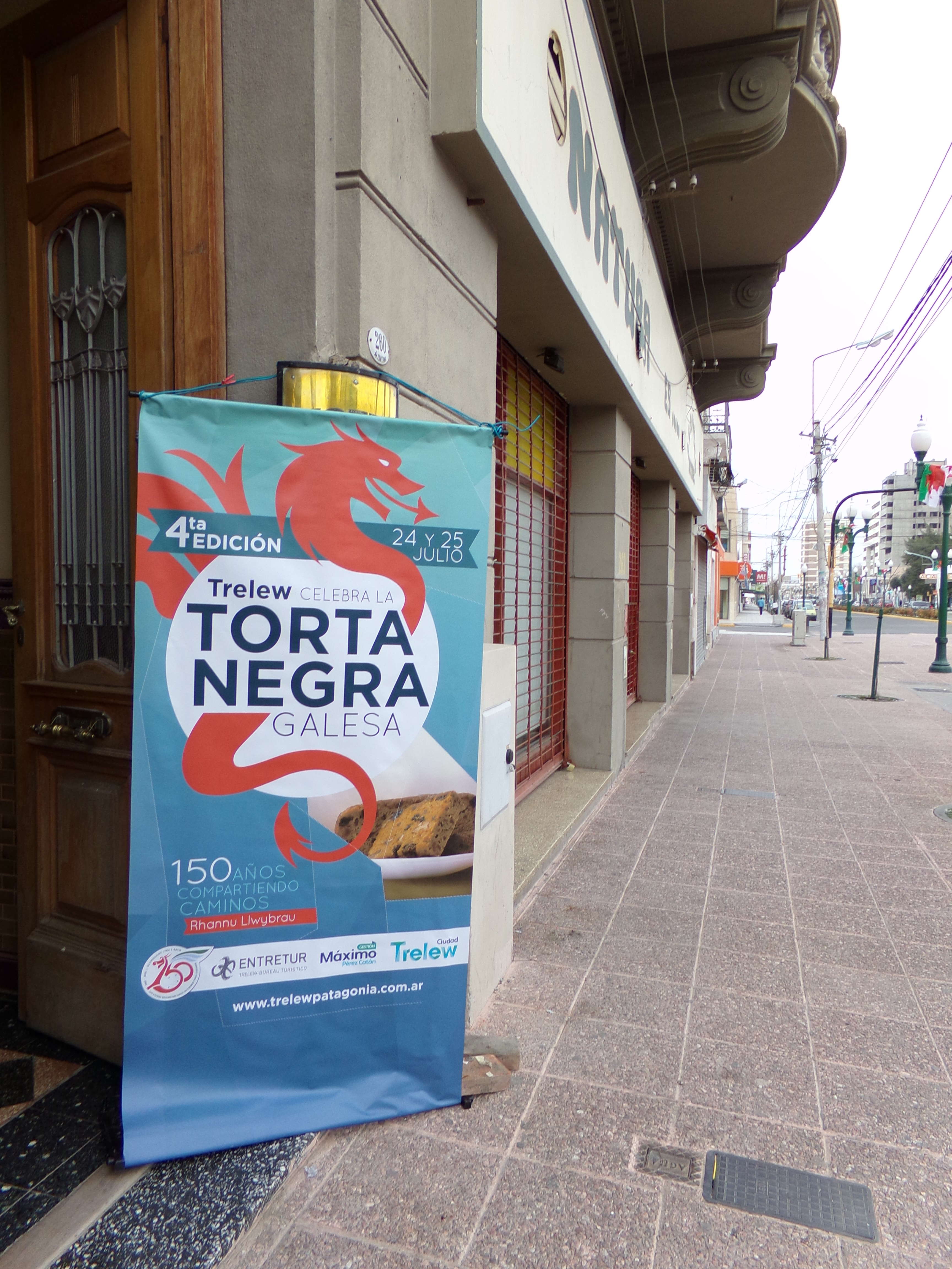 Calles de Trelew, Chubut, Argentina, decoradas para Sesquicentenario (150° Aniversario) de la Colonia Galesa de la Patagonia.